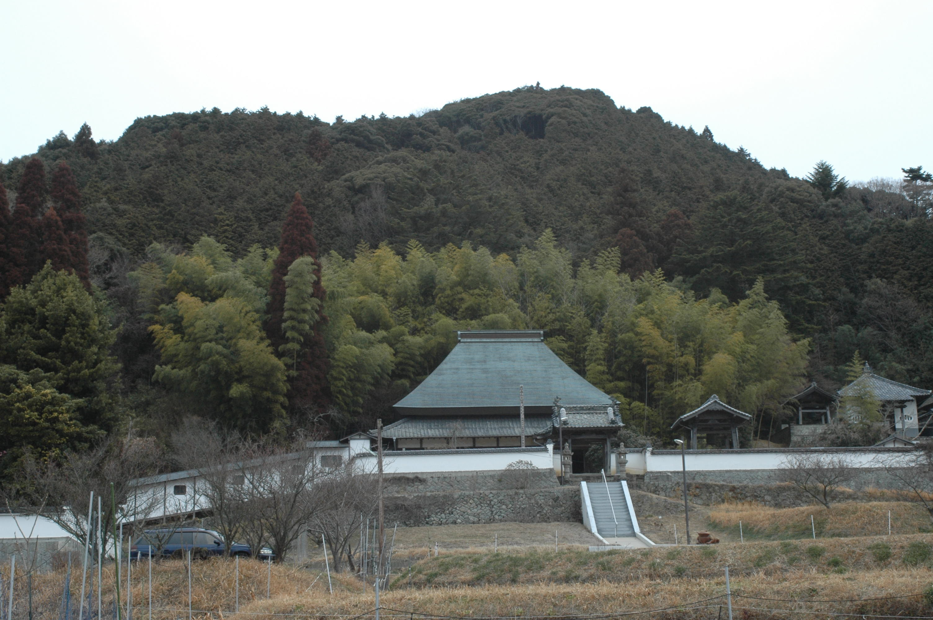 八塔寺ふるさと村の高顕寺本堂